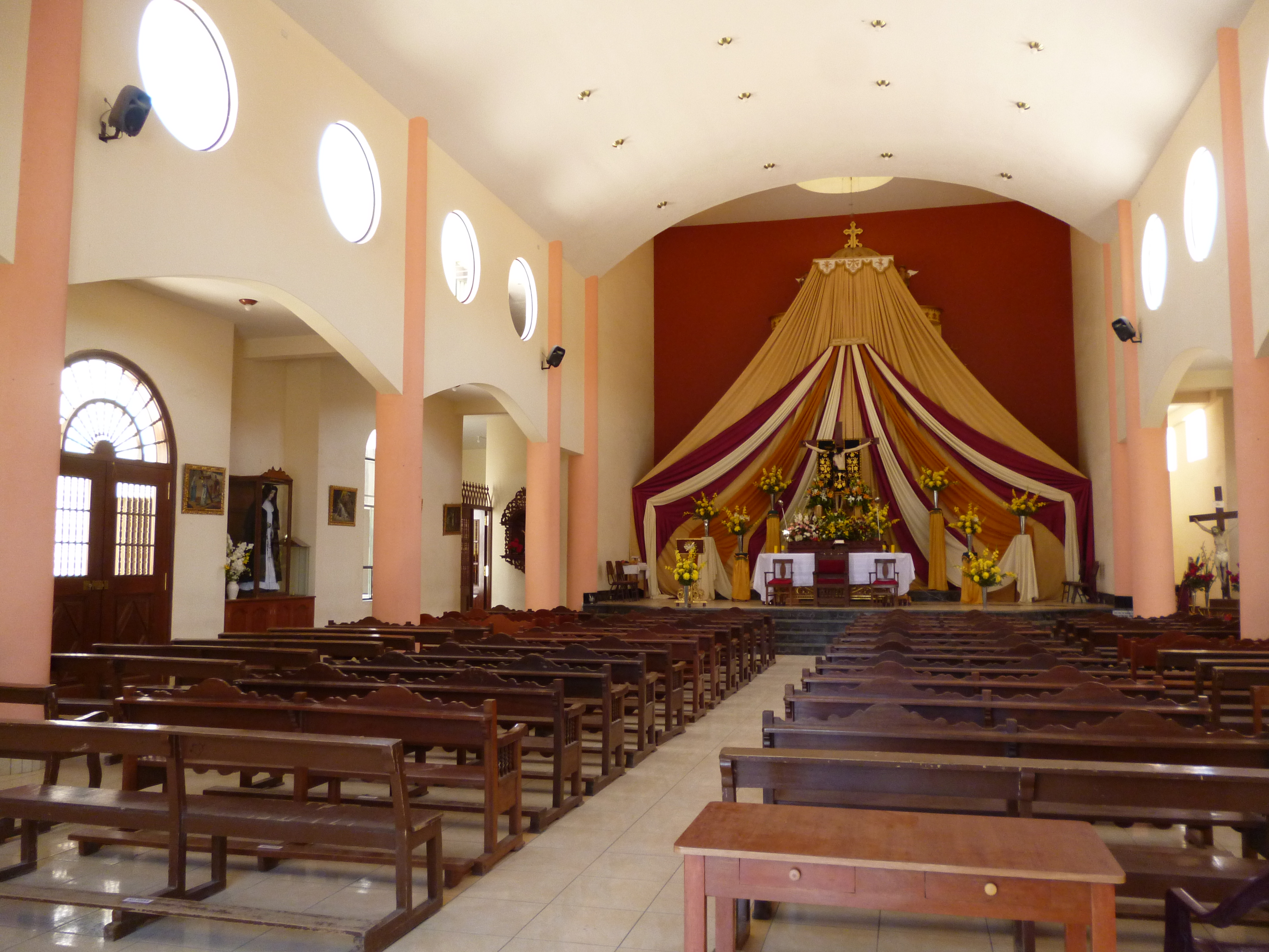 Vista del Interior de la Iglesia del Distrito de La Joya.